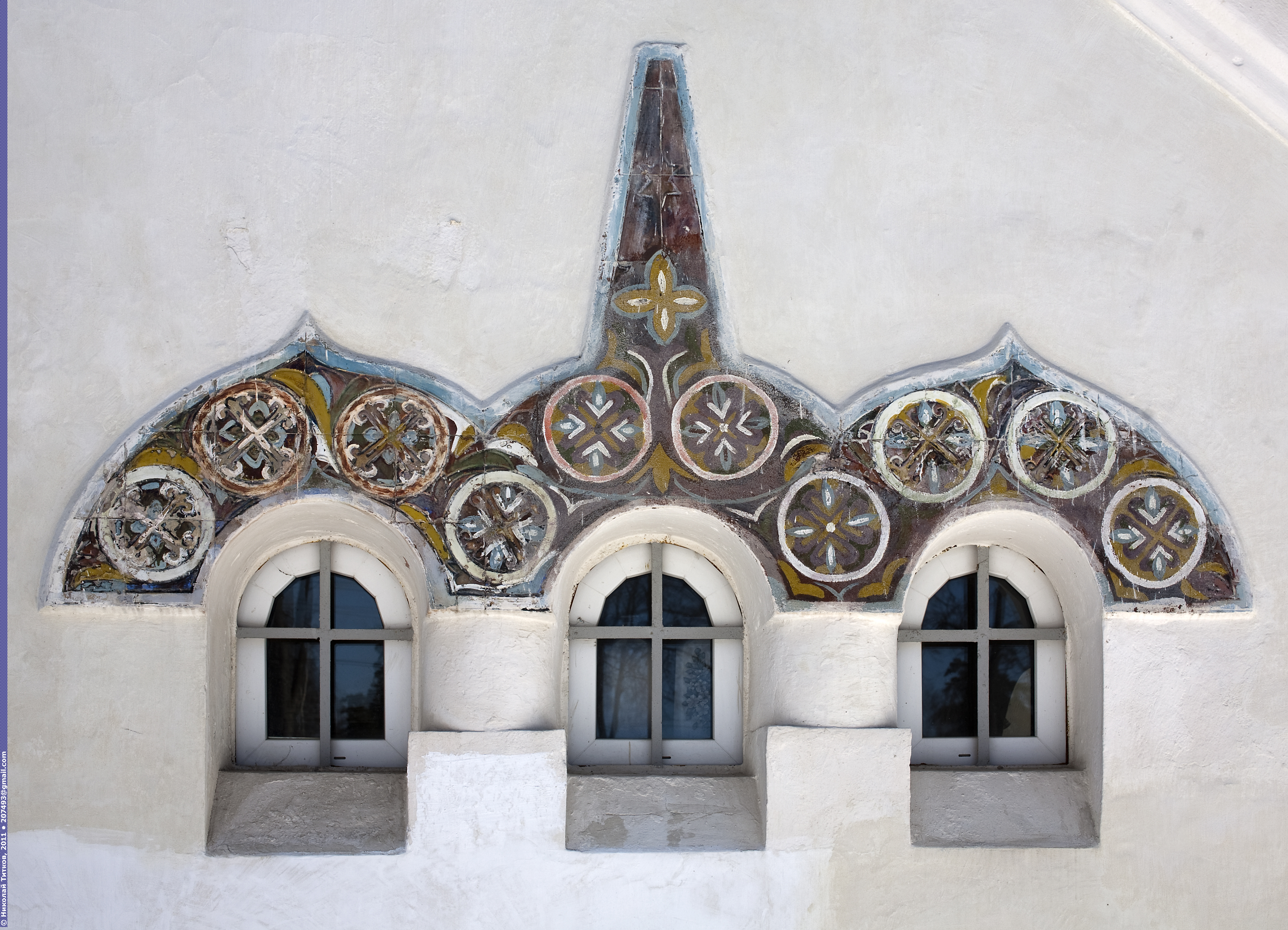 Кубический храм, завершённый главкой на горке кокошников, с пристроенной с запада звонницей, украшенный майоликовыми панно. Интересный образец неорусского стиля, построен в честь 300-летия Романовых по рисунку С. И. Вашкова, первоначально предполагался к освящению как Николо-Алексиевский. По ряду сведений так и не был освящён. В послереволюционные годы служил общежитием, складом. Открыт в 1989, освящён как Спасский, отреставрирован. Карточка храма